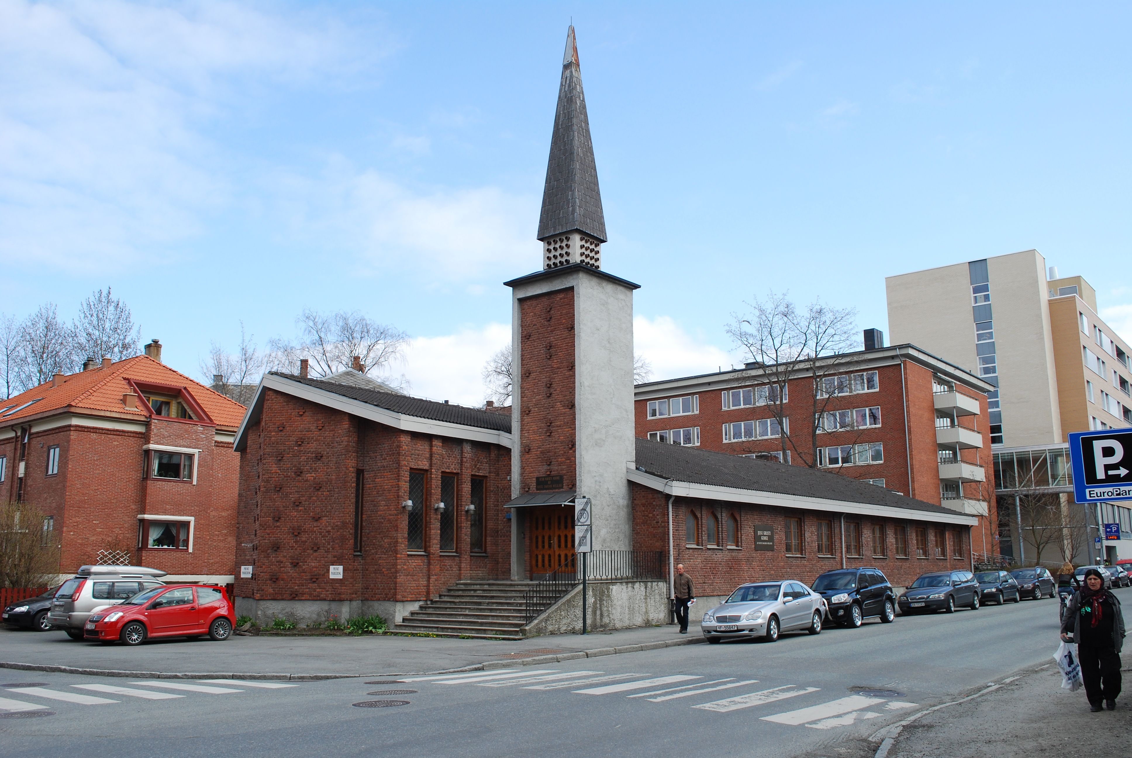 Jesu kristi kirke Av Siste Dagers Hellige ved Mauritz Hansens gate 5 i Trondheim.